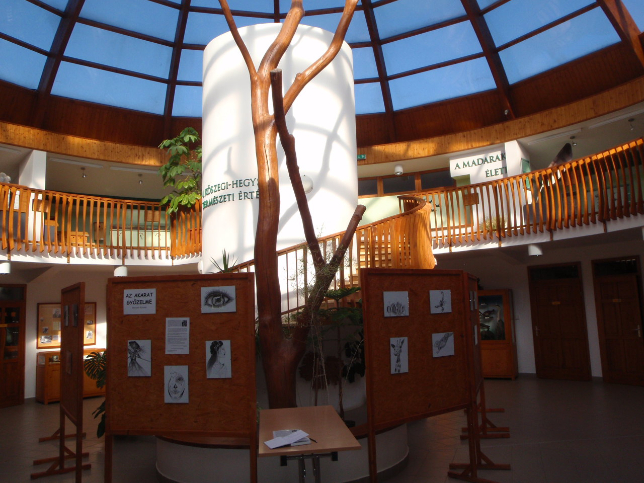 Bechtold István Látogatói Központ Kőszeg, kiállító tér a kupolával